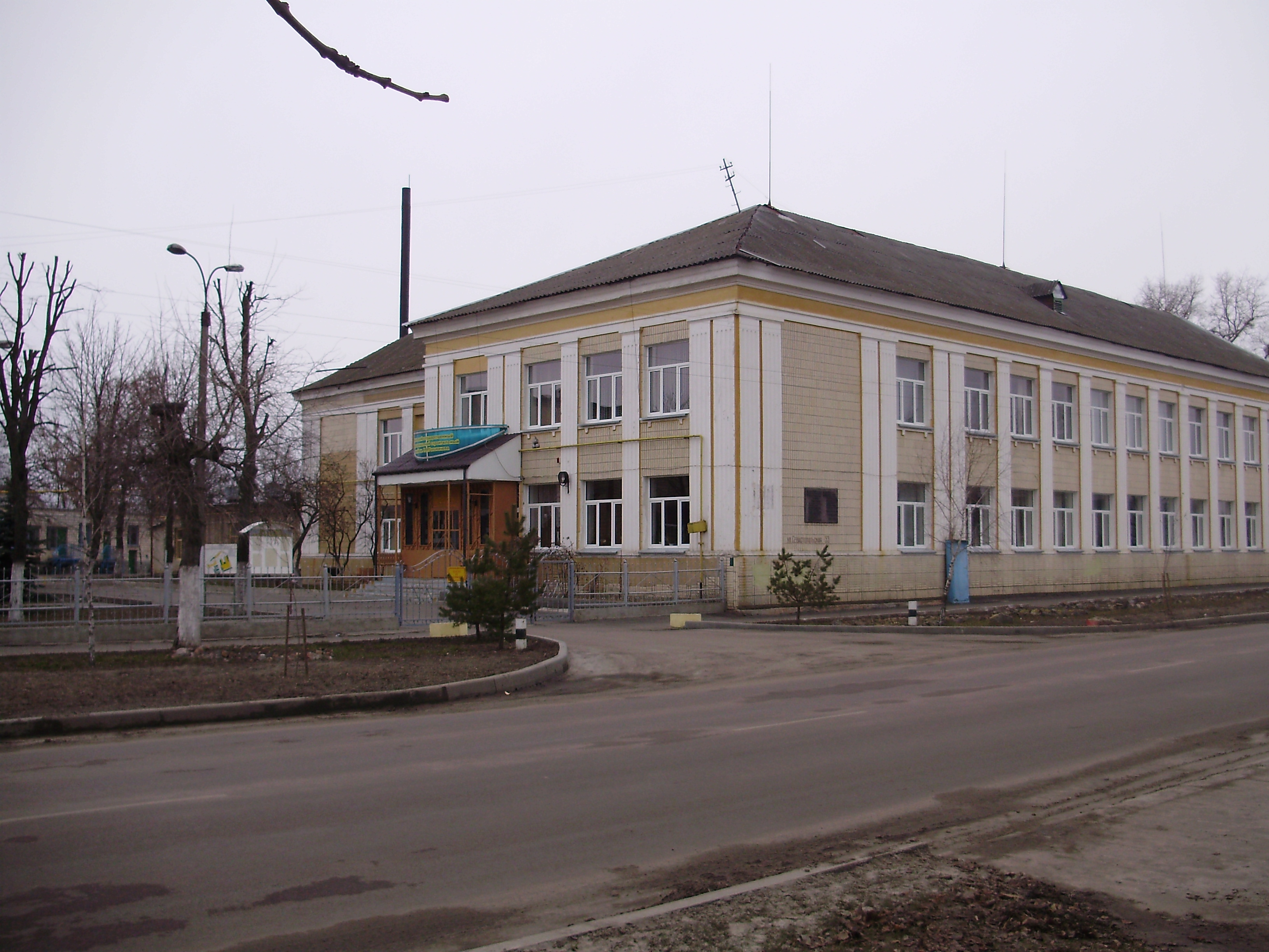 Беларуская (тарашкевіца): ПТВ імя Галавачова, вул.Севастопальская, г. Гомель